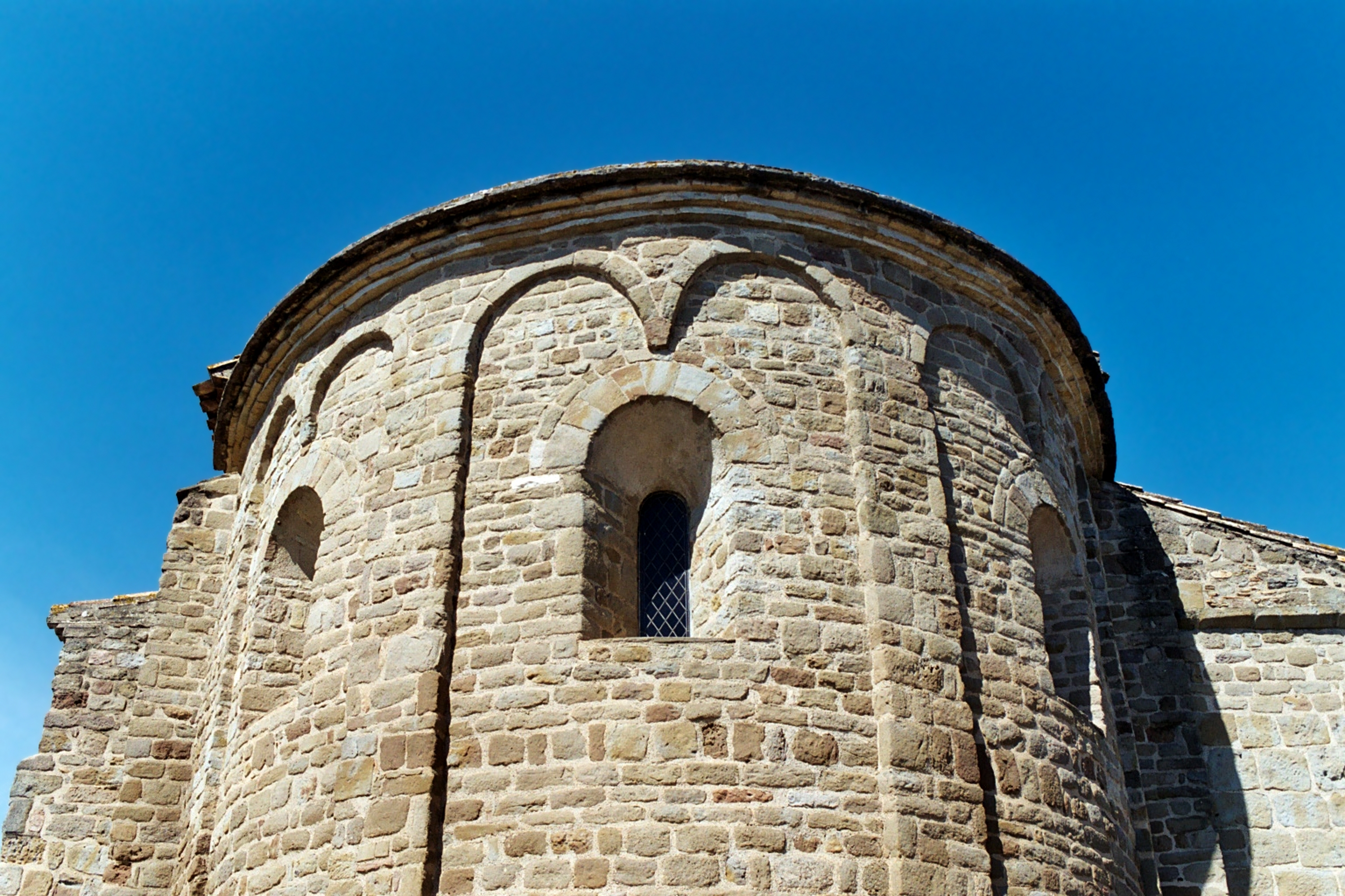 France - Languedoc - Aude - Église Saint-Étienne de Blomac